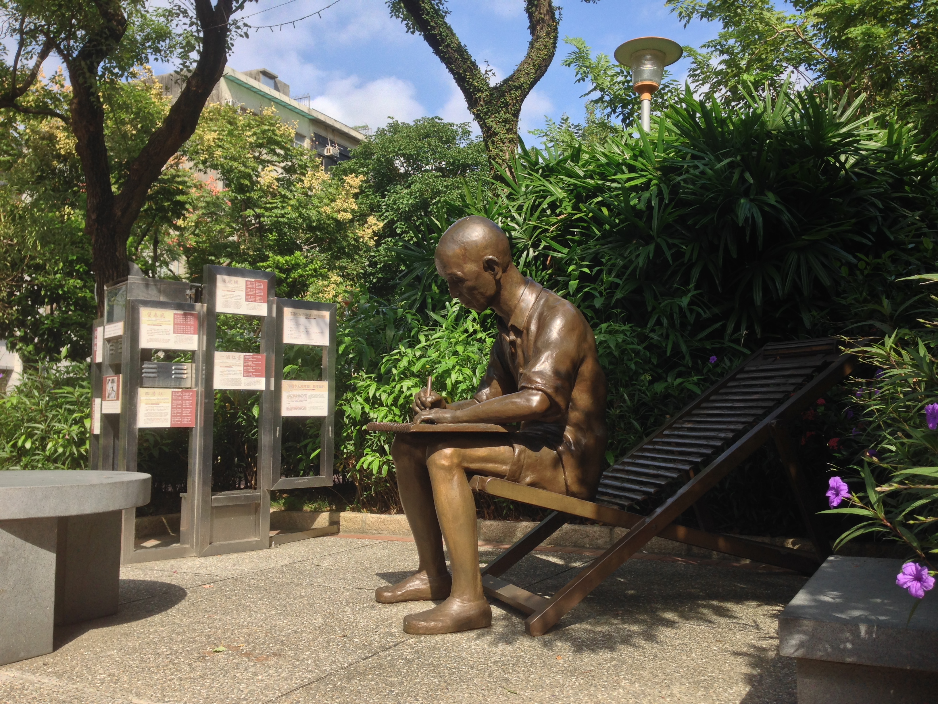 中文（台灣）: 大稻埕公園李臨秋銅像。